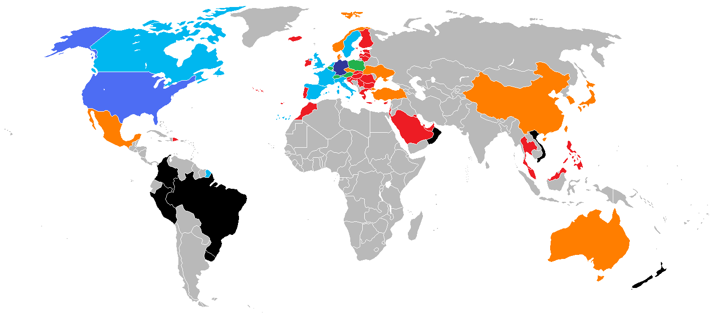 Map of IKEA stores around the world/Карта магазинов IKEA по всему миру